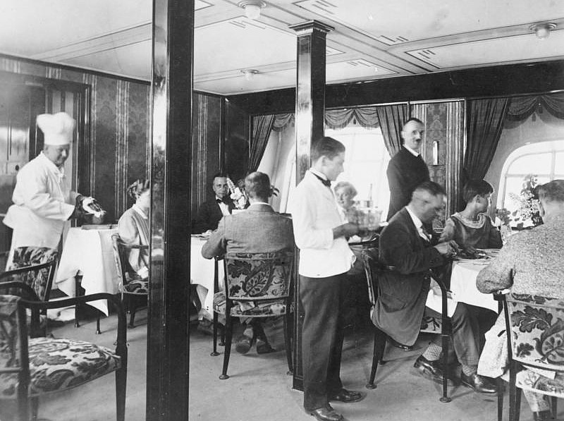 Wie die Passagiere des "Graf Zeppelin" auf der Weltreise wohnen! Der Speisesaal des "Graf Zeppelin" in der Mittagszeit.